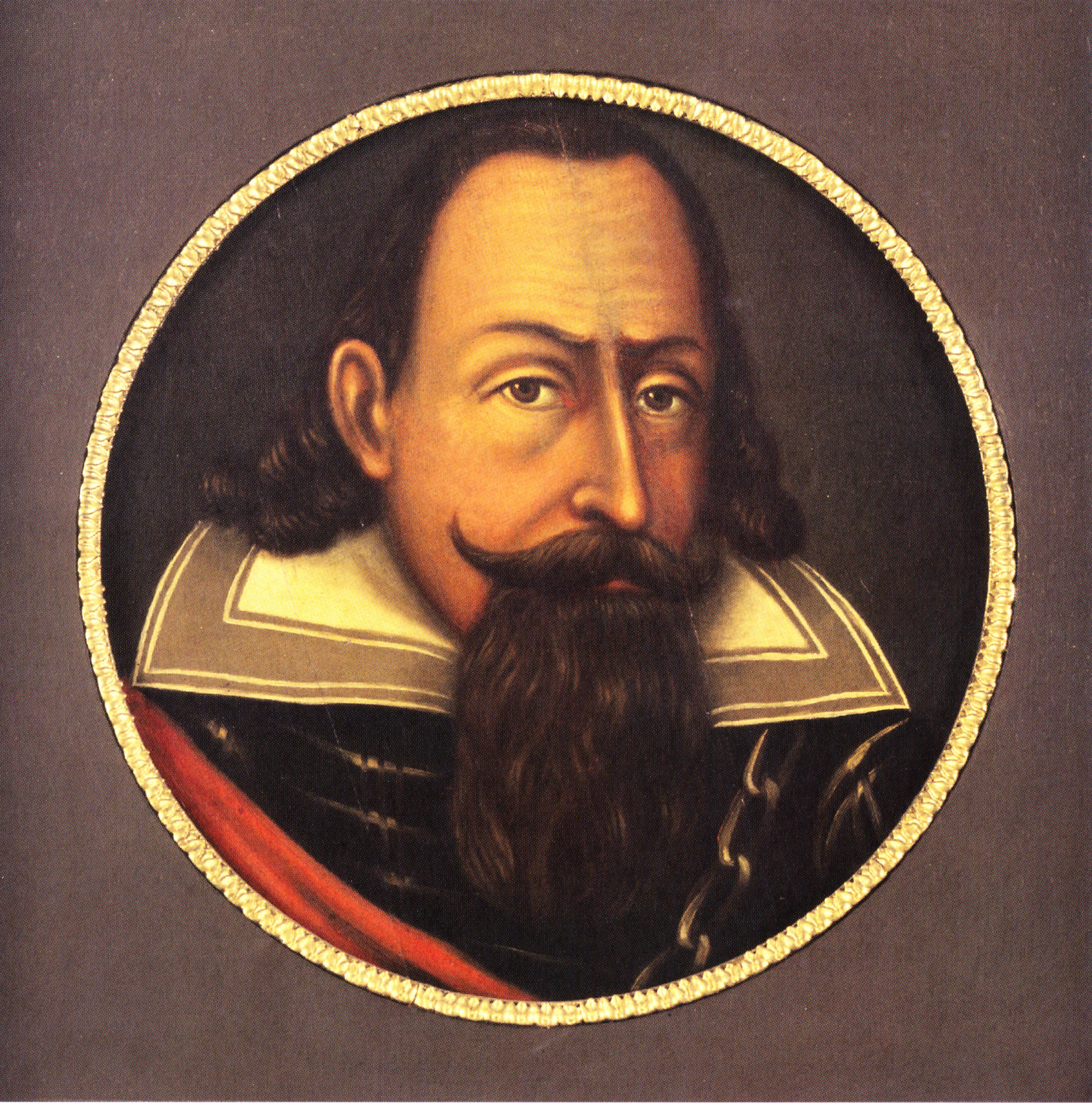 Ölgemälde von Herzog Philipp II. von Pommern, früher in der Börse Stettin